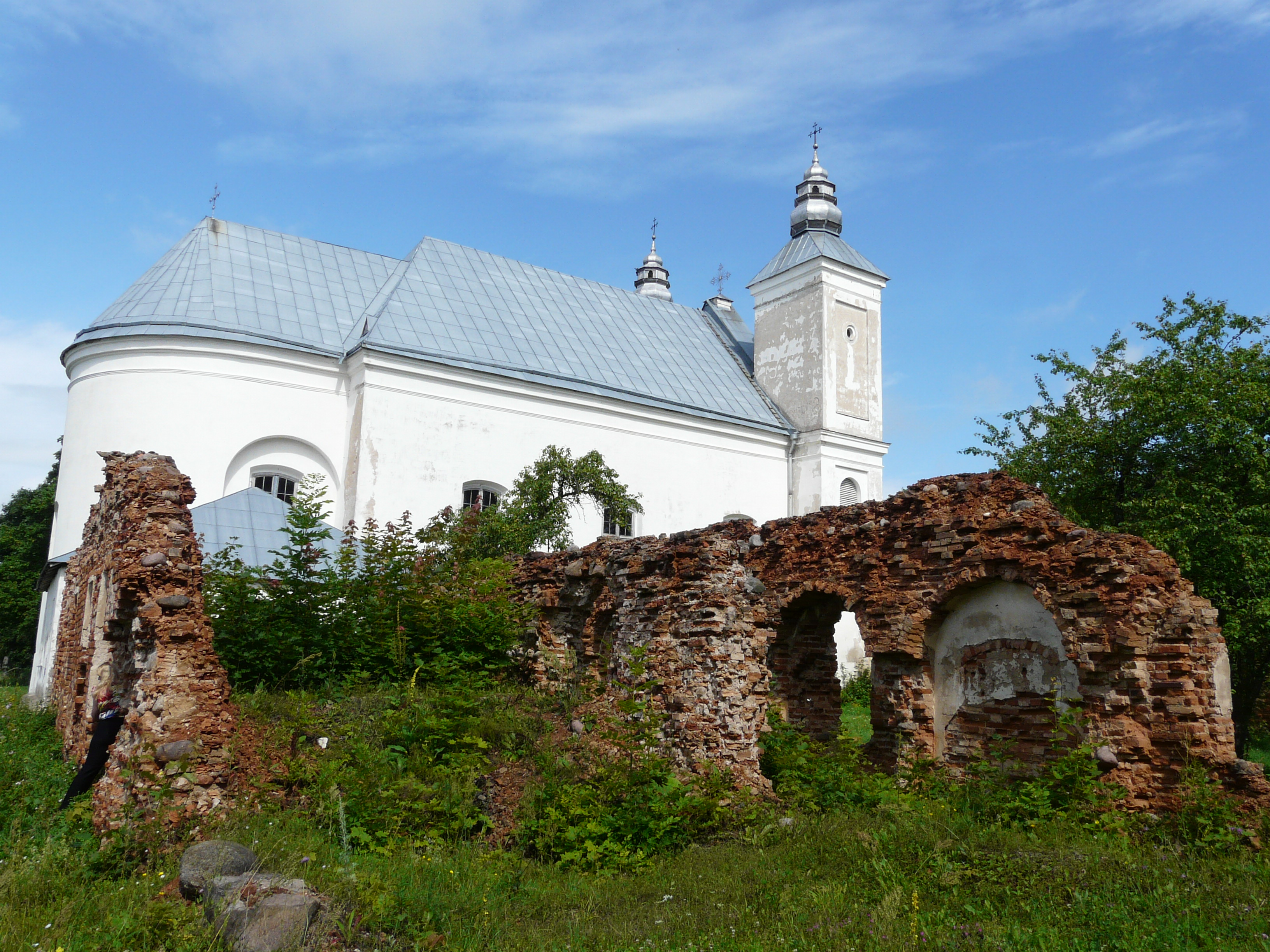 Беларуская (тарашкевіца): Комплекс кляштара кармэлітаў: касьцёл жылы кляштарны корпус вежа-званіца брама. в. Засьвір This is a photo of Belarusian heritage monument. Reference number: 612Г000430 ( WLM)